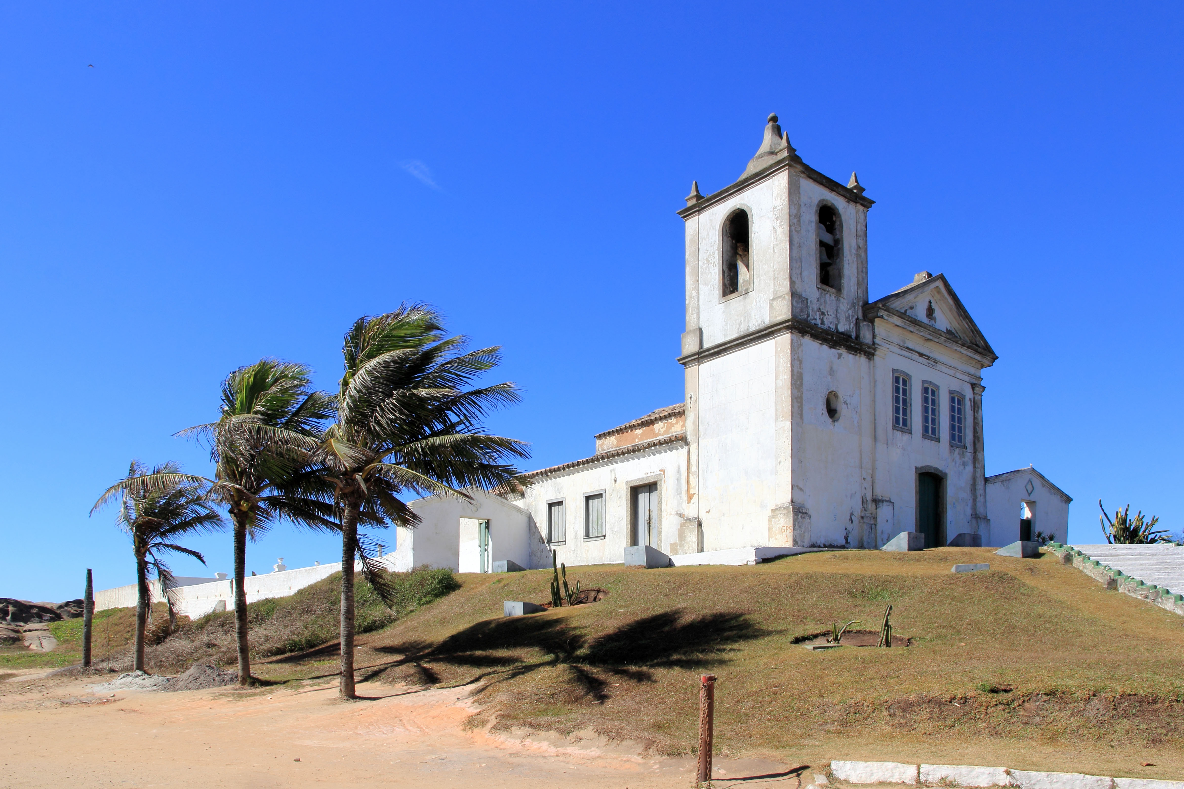 Capela de São João Batista, Barra de São João é o segundo distrito do município de Casimiro de Abreu.